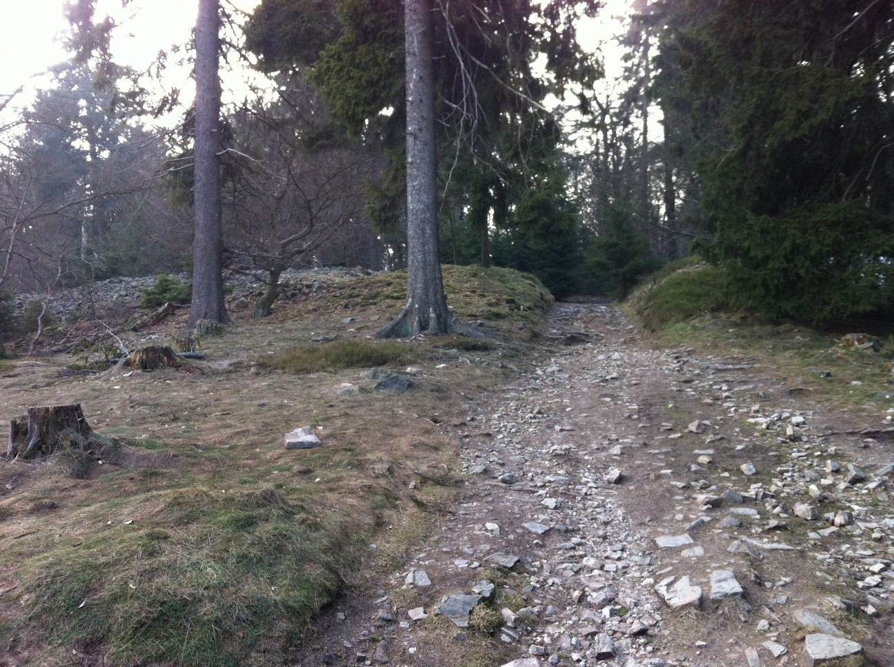 Wirtschaftsweg Altkönig zwischen den Ringwällen